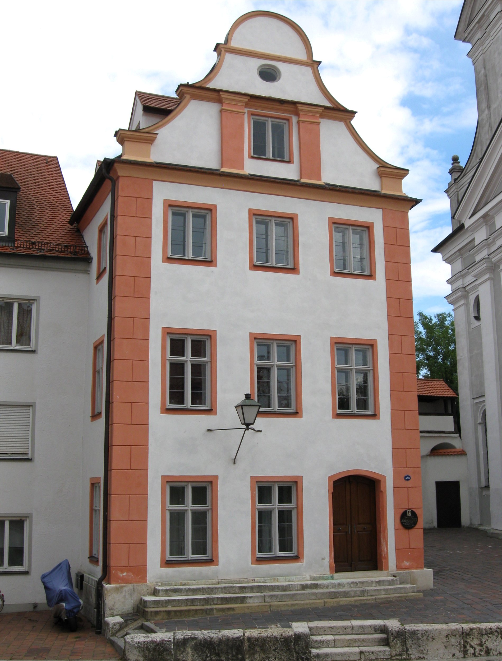 Amalienstraße A 25; ehemaliges Chorstift-Kaplanhaus, dreigeschossiger Bau mit Schweifgiebel, im Kern 16. Jahrhundert, Umbau 18. Jahrhundert Mit Teilen der Stadtbefestigung auf dem Flurstück. Siehe Eintrag Stadtbefestigung. D-1-85-149-11